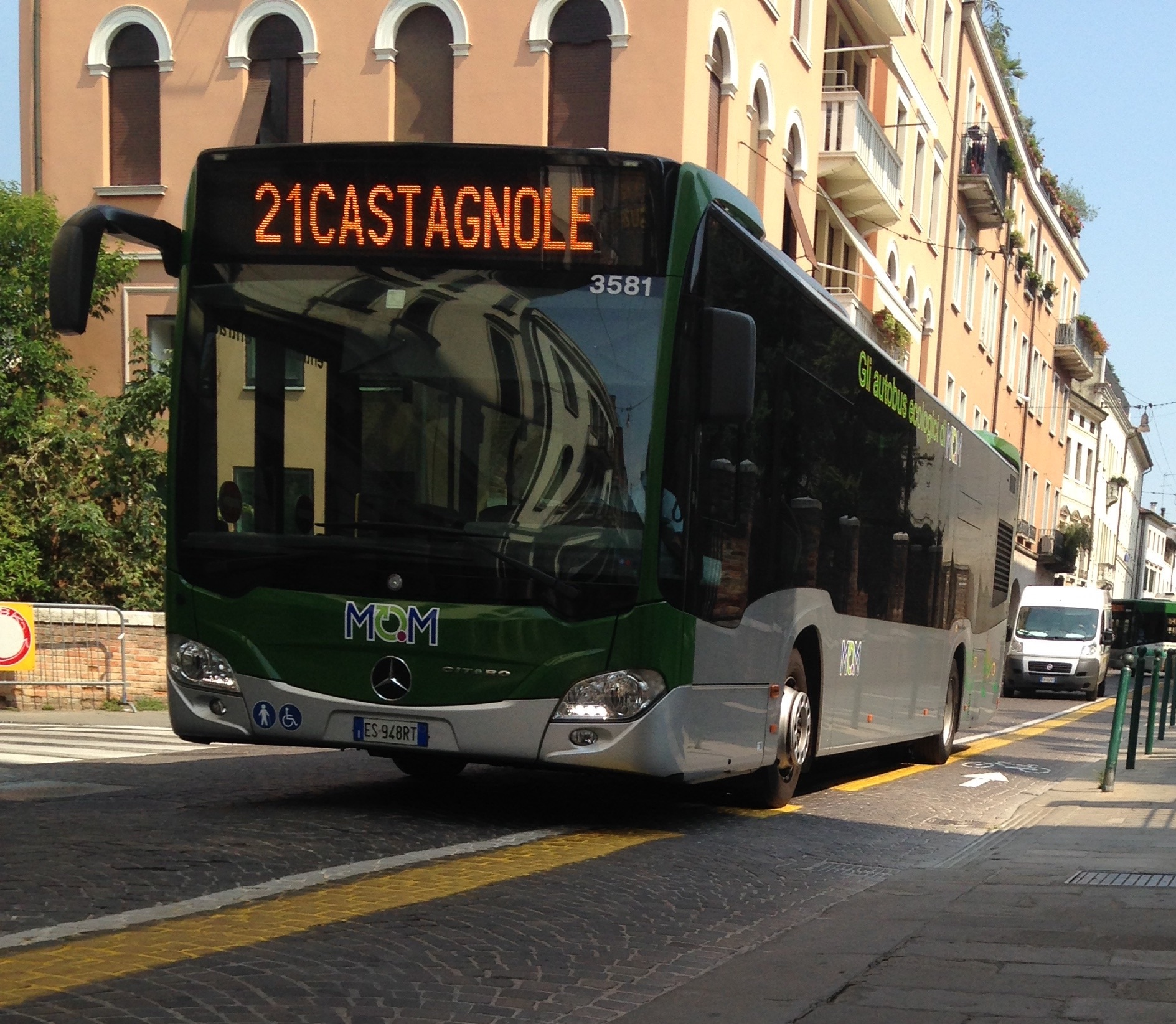 Autobus 3581 Mercedes-Benz Citaro O530BZ di MOM-Mobilità di Marca (ex ACTT) Treviso, presso via Canova in Treviso, in servizio urbano sulla Linea 21, diretto a Castagnole di Paese.